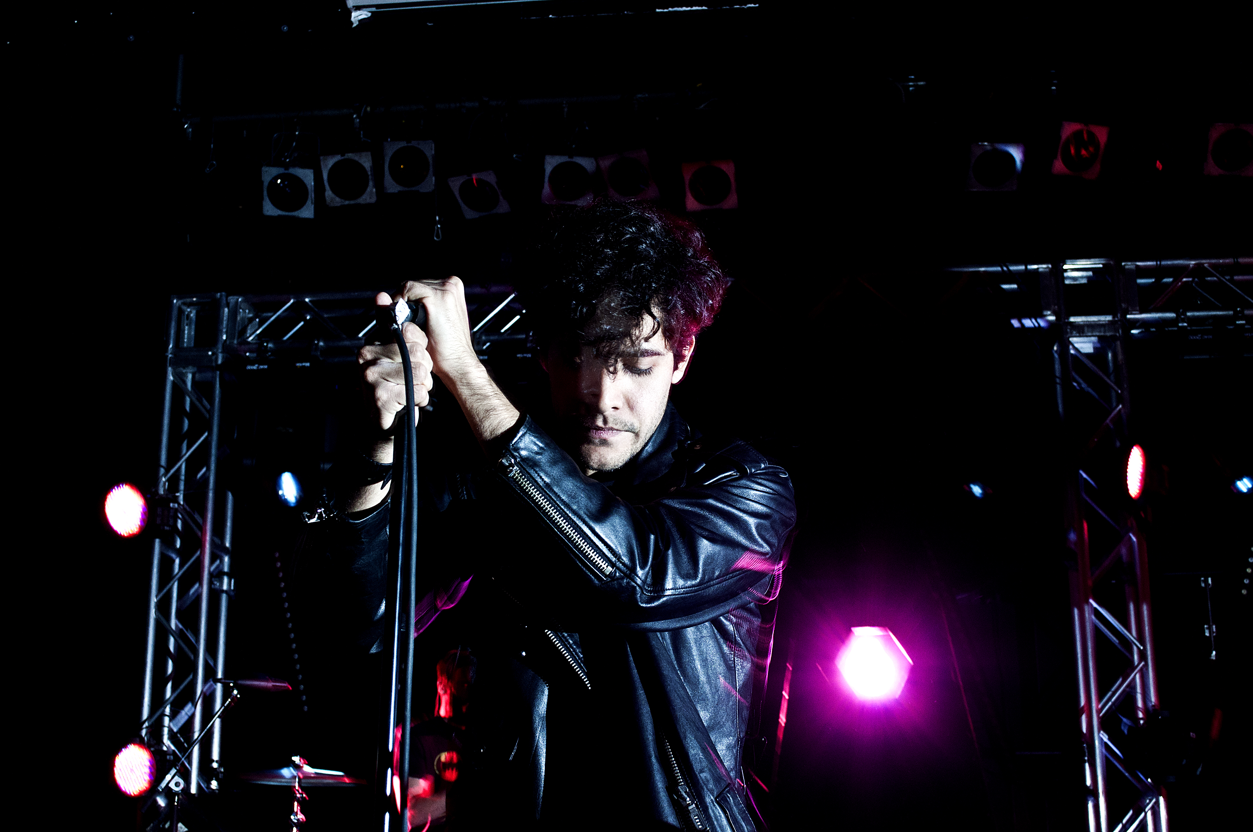 Neon Indian